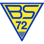 Logo for Albertslund BS72